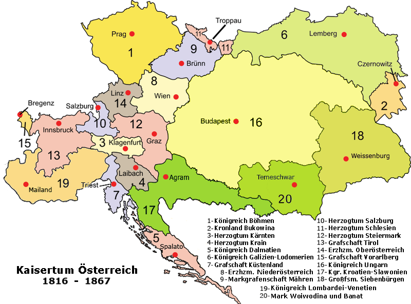 Kaiserreich Österreich 1816-1867